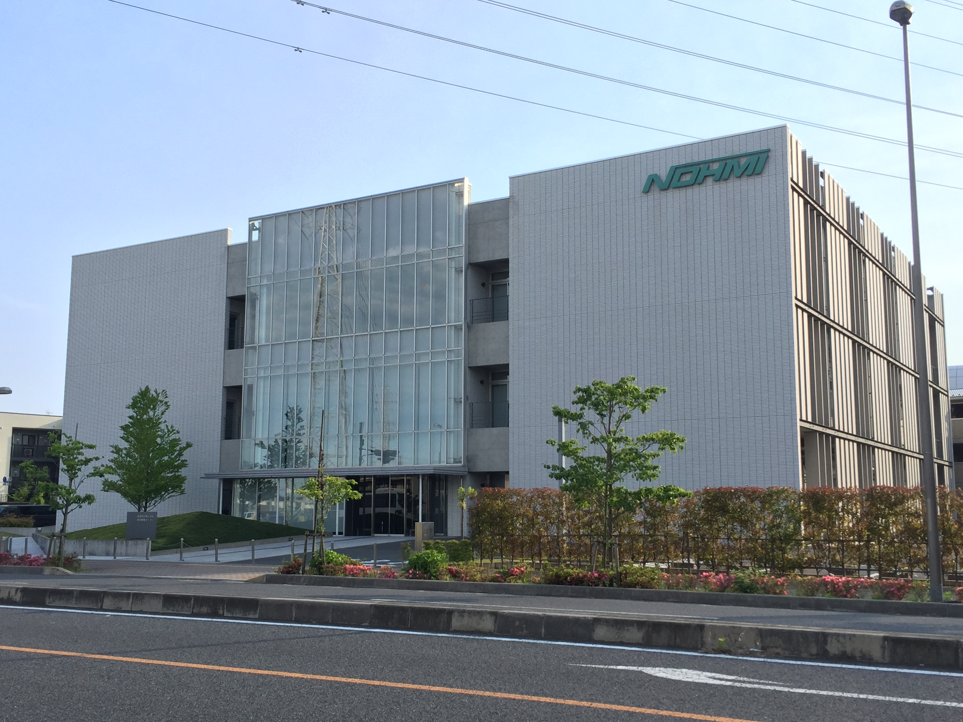 能美防災研究開発センター